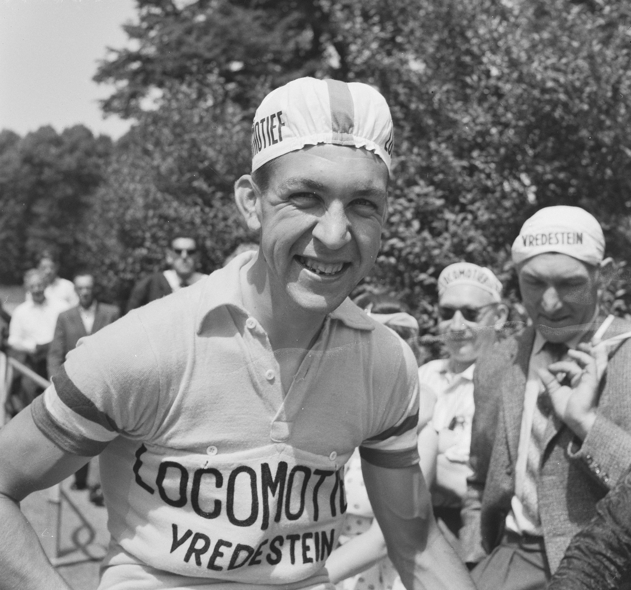 Collectie / Archief : Fotocollectie Anefo Reportage / Serie : [ onbekend ] Beschrijving : Koppen van Nederlandse renners, die deelnemen aan de Tour de France , Martin Van de Borgh Datum : 22 juni 1959 Fotograaf : Behrens, Herbert / Anefo Auteursrechthebbende : Nationaal Archief Materiaalsoort : Negatief (zwart/wit) Nummer archiefinventaris : bekijk toegang 2.24.01.03 Bestanddeelnummer : 910-4593